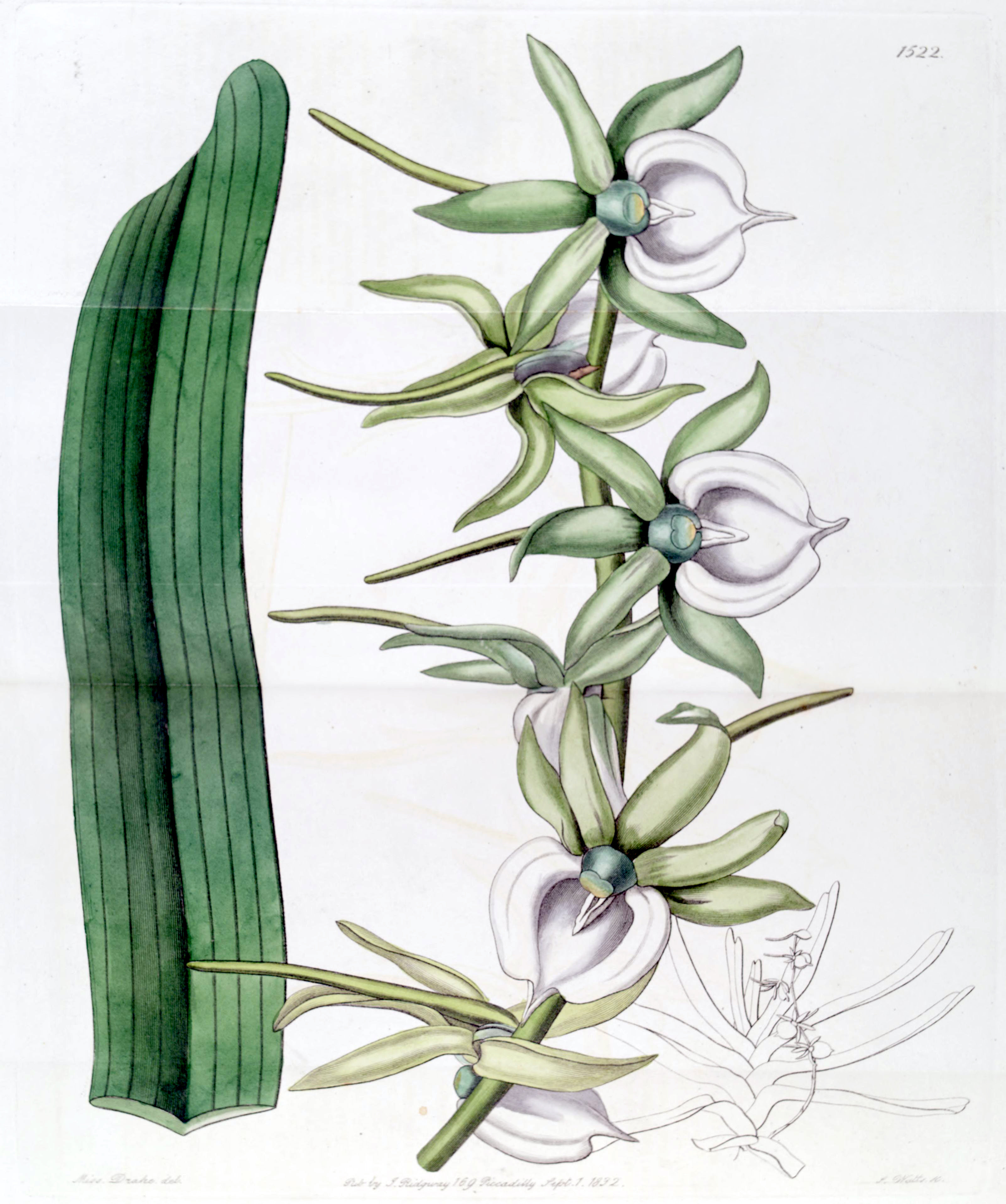 Angraecum eburneum